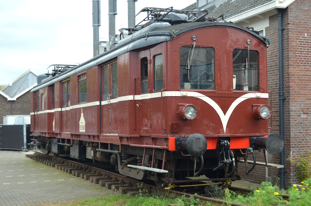 Spoorparade Amersfoort; mBD 9006 'Jules'. Foto: Erik Swierstra.